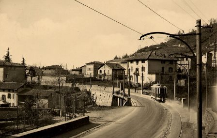 Nembro, cartolina con tram